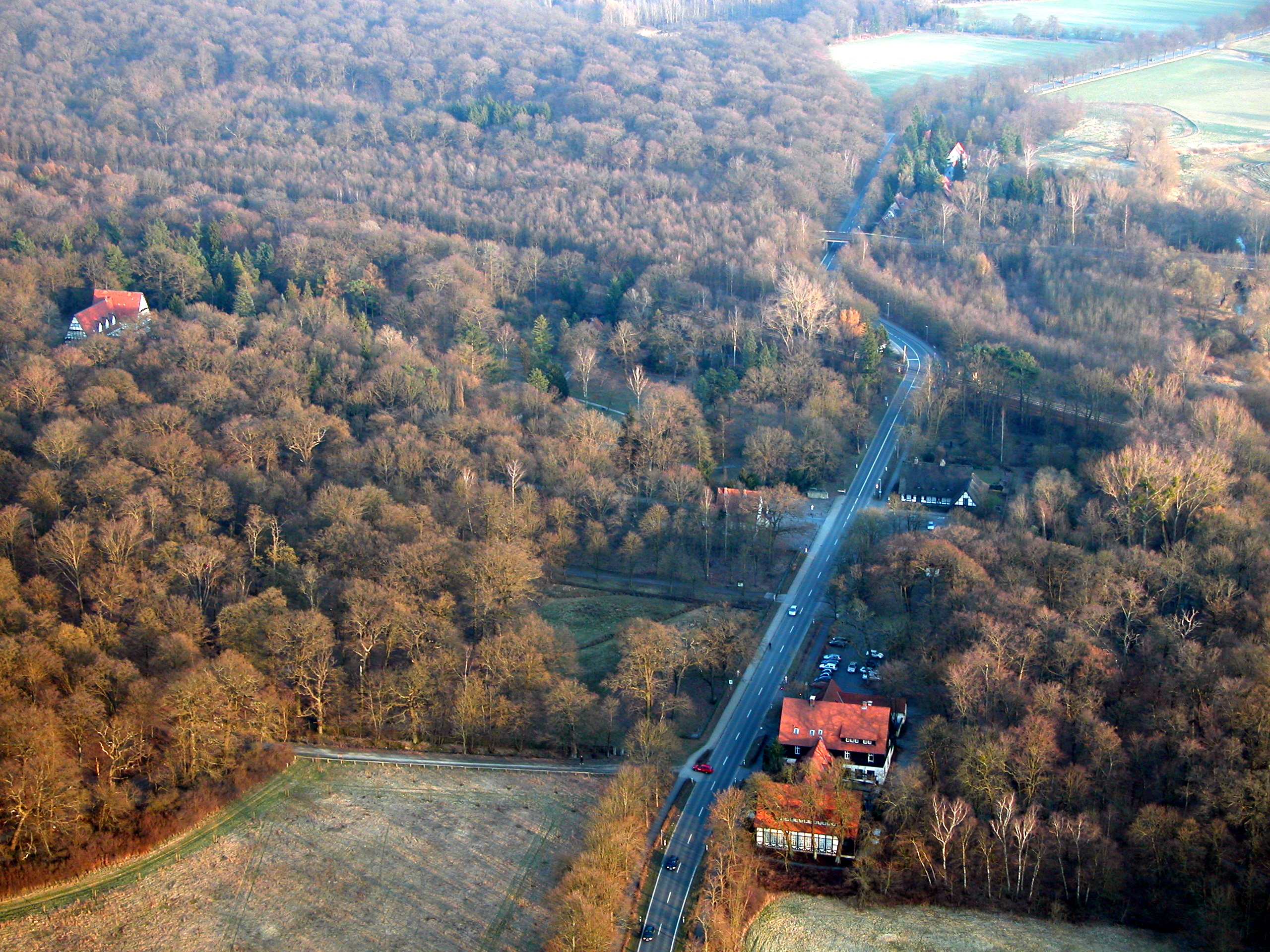 Braunschweig, Luftaufnahme eines Teils der Buchhorst in Riddagshausen mit „Grünem Jäger“ (rechts, entlang der Ebertallee). Im Hintergrund im Knick des Straßenverlaufs ist links das rote Dach der ehemaligen Bahnstation „Grüner Jäger“ zu erkennen. Links am Bildrand ist der ehemalige Reichsjägerhof „Hermann Göring“ sichtbar. Große Teile des abgebildeten Waldes liegen im NSG Riddagshausen.